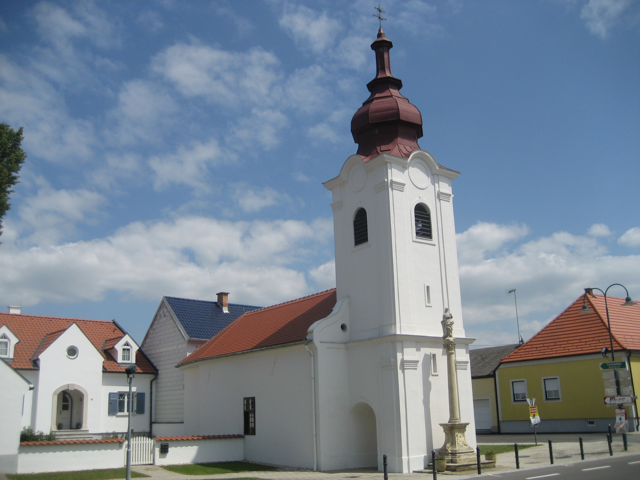 Ortskapelle zum heiligen Michael in Zurndorf im Burgenland